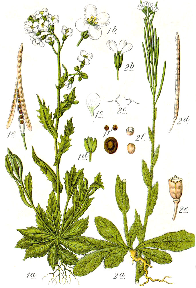 1: Arabis alpina subsp. alpina, syn. Crucifera arabis E.H.L.Krause 2: Arabis hirsuta (L.) Scop., syn. Crucifera contracta E.H.L.Krause Original Caption 1. Alpen-Grützblume, Crucifera arabis 2. Kleines Turmkraut, Crucifera contracta